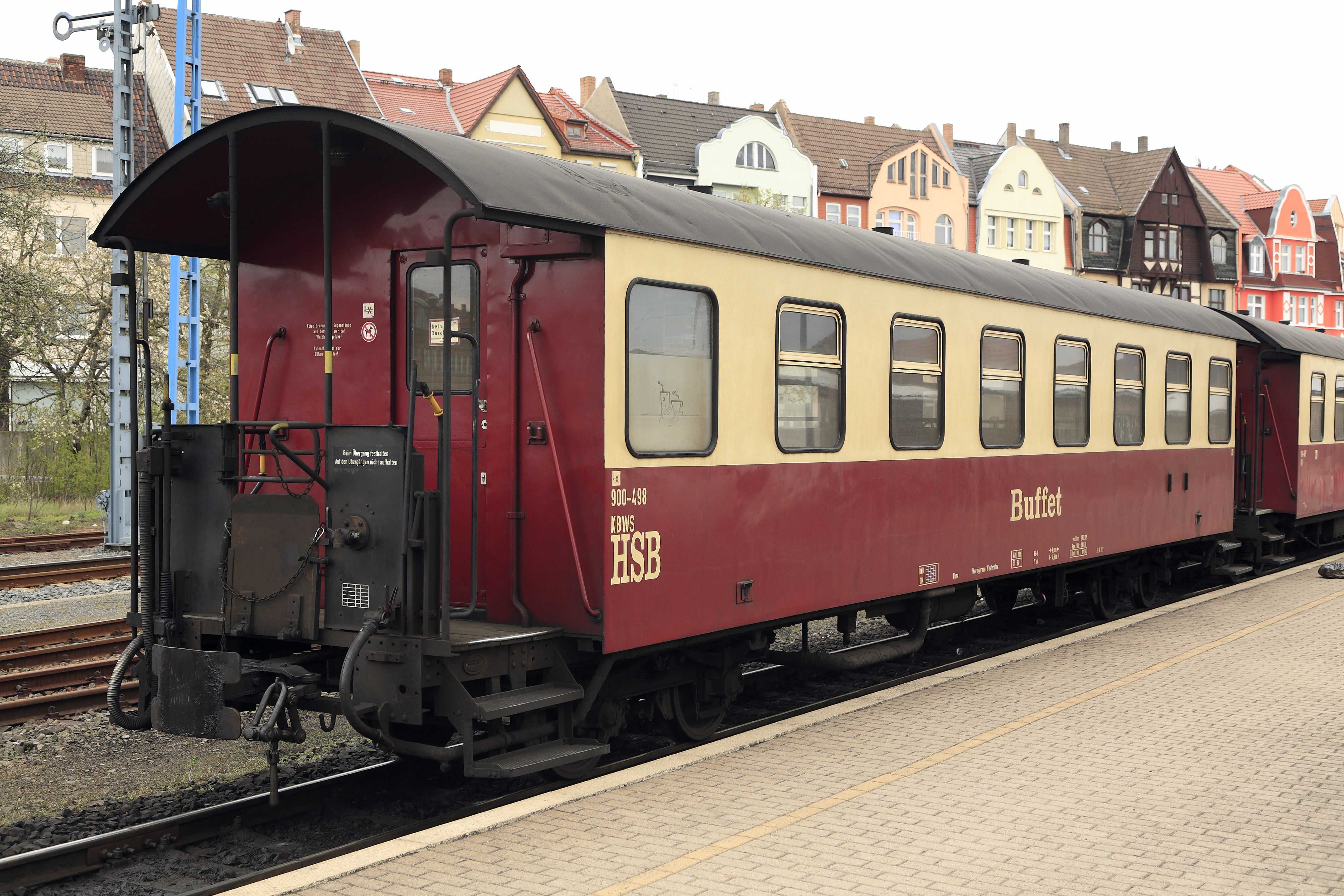 Äußerlich ist dieser Wagen den für das Harznetz gebauten wegen der Neubauwagenkästen vom Raw Perleberg sehr ähnlich, doch zeigen die schwenkbaren, durch die Drehgestelle geführten Kupplungen und die Form der Drehgestellrahmen mit Ausgleichshebel zwischen den Tragfedern, dass die Wagen aus Sachsen stammen. Das fehlende Sprengwerk und die Form der Kopfstücke und Einstiegsbühnen sind Anzeichen für Einheitswagen aus den 1920ern in Stahlbauart. Viele der ehemals sächsischen Wagen liefen zwischenzeitlich bei der Spreewaldbahn, sie wurden schon für diesen Einsatz auf Meterspur umgebaut. Dabei wurde gleichzeitig der Raddurchmesser vergrößert, die Folge der höheren Lage des Bodenrahmens erforderte den Einbau einer zusätzlichen Trittstufe. Die schwenkbaren Kupplungsschäfte waren eine Vorleistung für die Einführung der Scharfenbergkupplung (und der Trichterkupplung mit engem Trichter für eine knickfreie Verbindung). Die sächsischen Drehgestelle mit Blattfedern wurden nur auf rollengelagerte Radsätze umgestellt, die sonstige Konstruktion blieb erhalten.